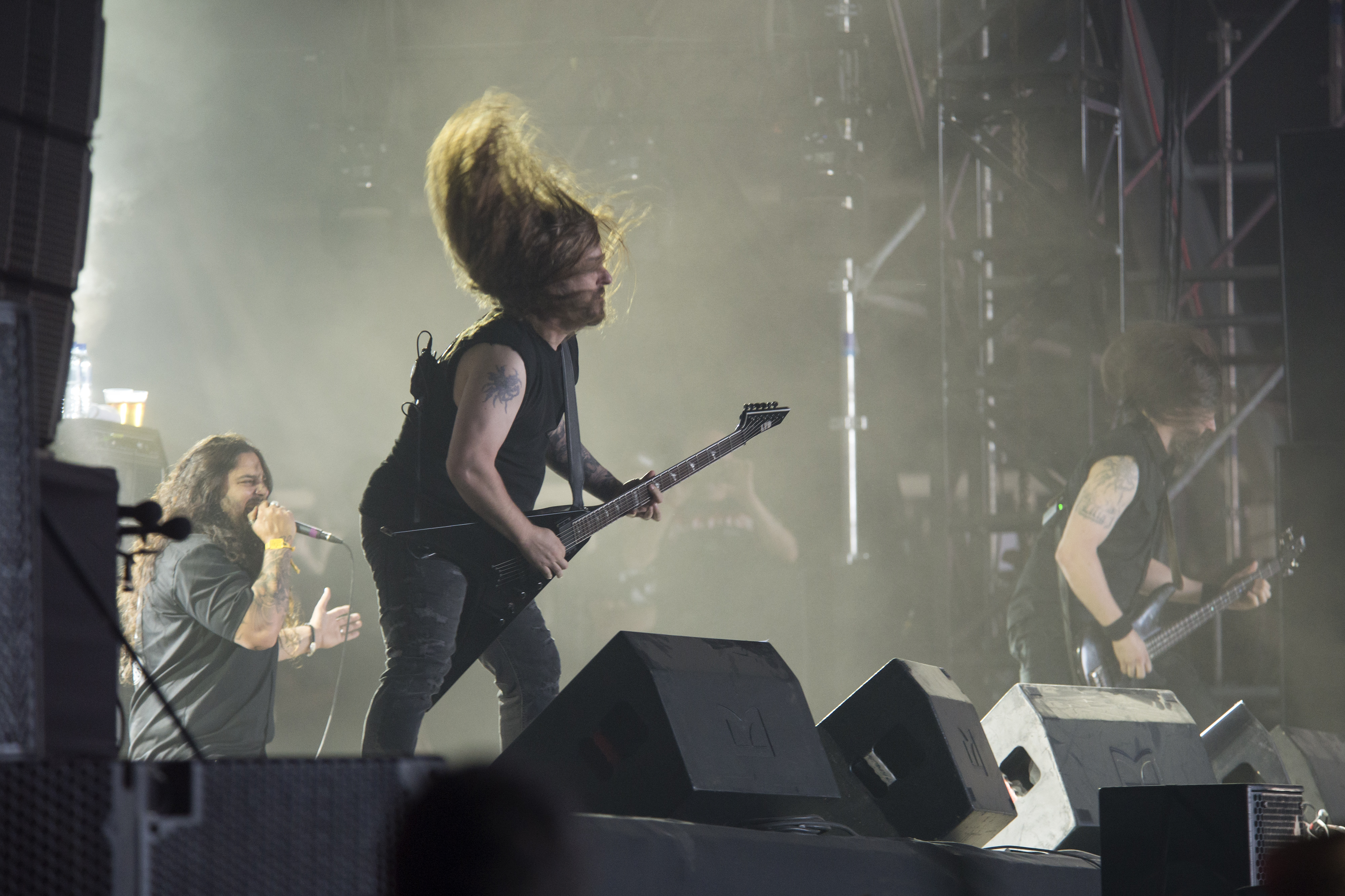 Le groupe canadien Kataklysm, Hellfest 2018.